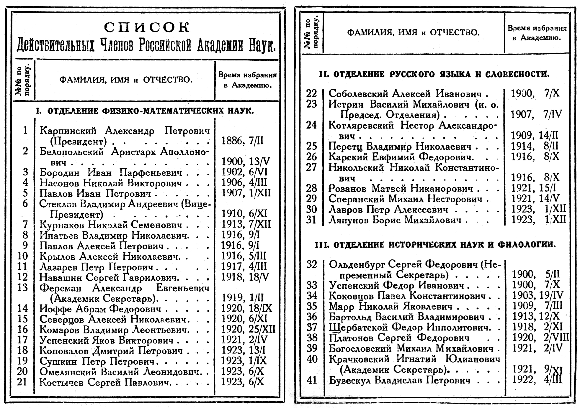 Записная книжка Российской академии наук (1725-1925). Ленинград: Российская академическая государственная типография, 1925. С. 8-9 (всего 18 с., тираж 600 экз.)1925